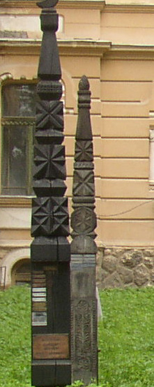 Kopjafa a csíkszeredai Márton Áron Gimnázium épülete előtt.